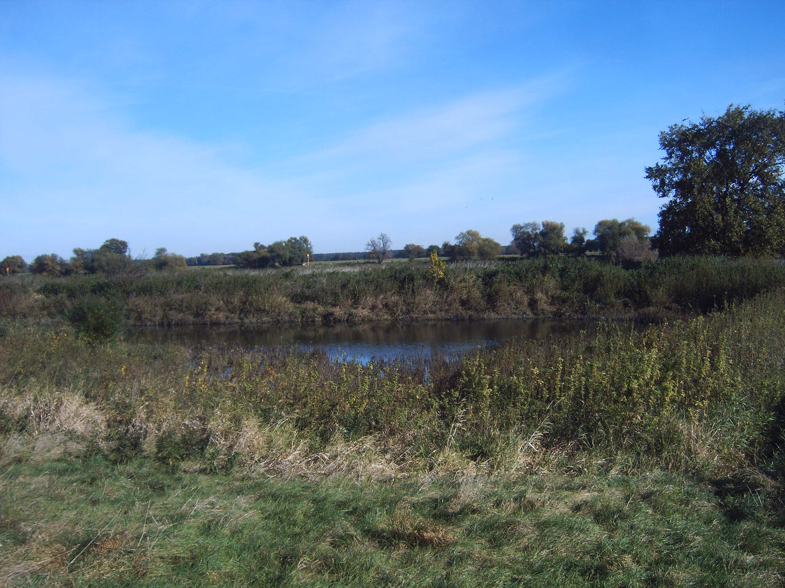 Gebiet der Wüstung Pötritz, alter Elbarm, möglicher Hafen von Pötritz, südlich von Westerhüsen, Magdeburg